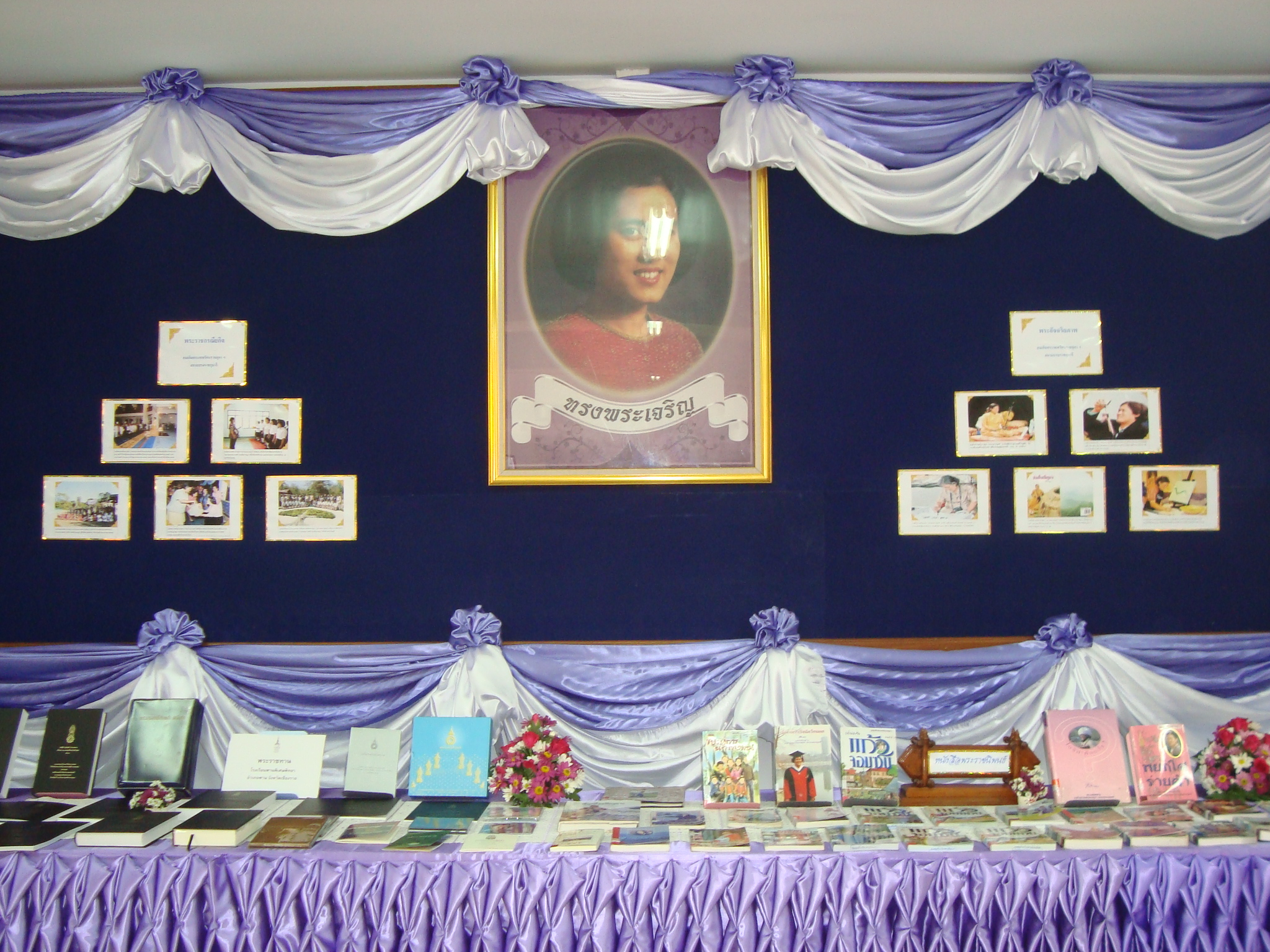 มุมหนังสือพระราชนิพนธ์ในสมเด็จพระเทพรัตนราชสุดาฯ สยามบรมราชกุมารี